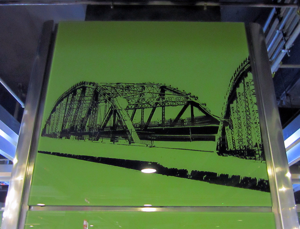 海珠廣場站柱面裝飾